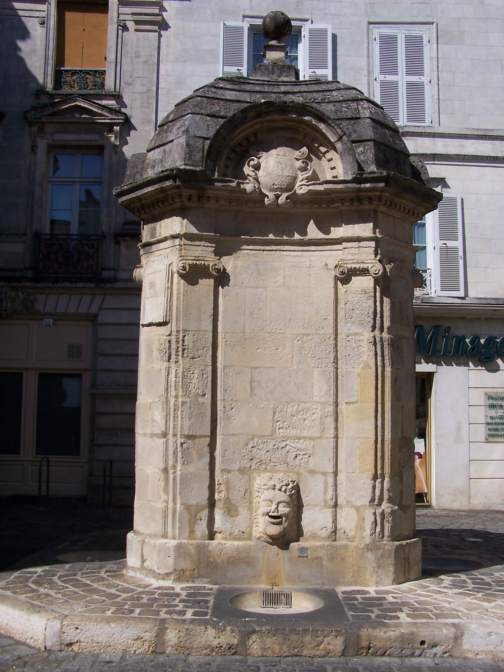 Promenade dans les rues de La Rochelle. Photographie de l'ancienne « Fontaine du Pilori ». À l'origine, la fontaine, qui s'appelait « Fontaine du Puits Lori », était au fond d'une énorme excavation circulaire de 20 pieds de diamètre, dans laquelle il fallait descendre par l'un des deux escaliers en forme de fer à cheval, d'accès difficile et dangereux, notamment en hiver. En 1711 la fosse est comblée, et en 1722, la fontaine, ramenée au niveau du sol, est de nouveau opérationnelle. Elle a été classée monument historique en 1925.